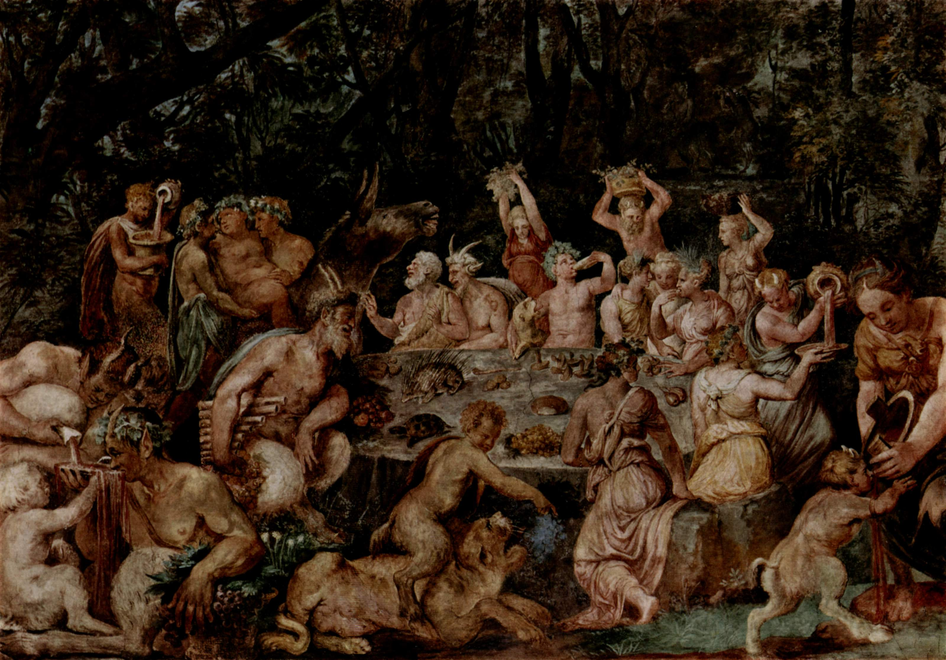 detail